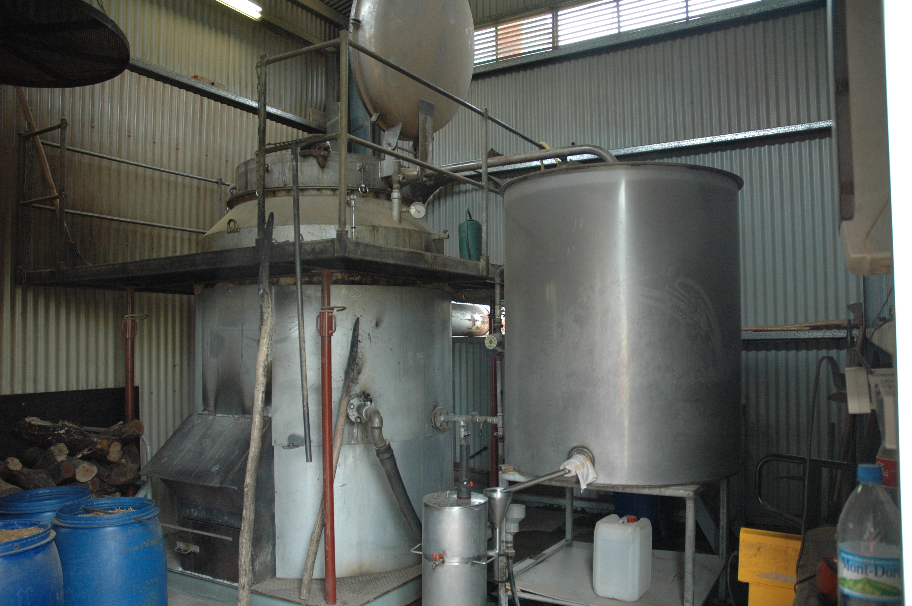 Alambic servant à la distillation du bois de Santal en Nouvelle Calédonie Santalerie de l'ile des pins .